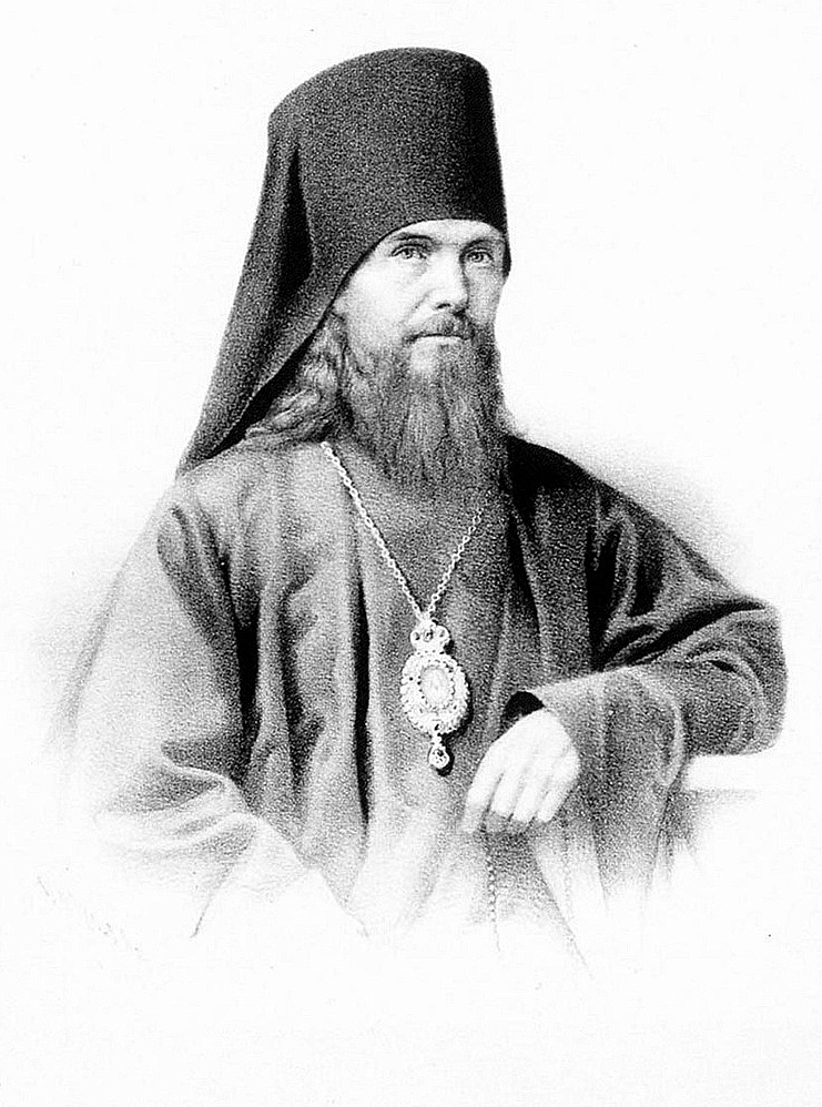 Свт. Феофан Затворник. Литография П.Ф. Бореля. 1860 г. (ГИМ)